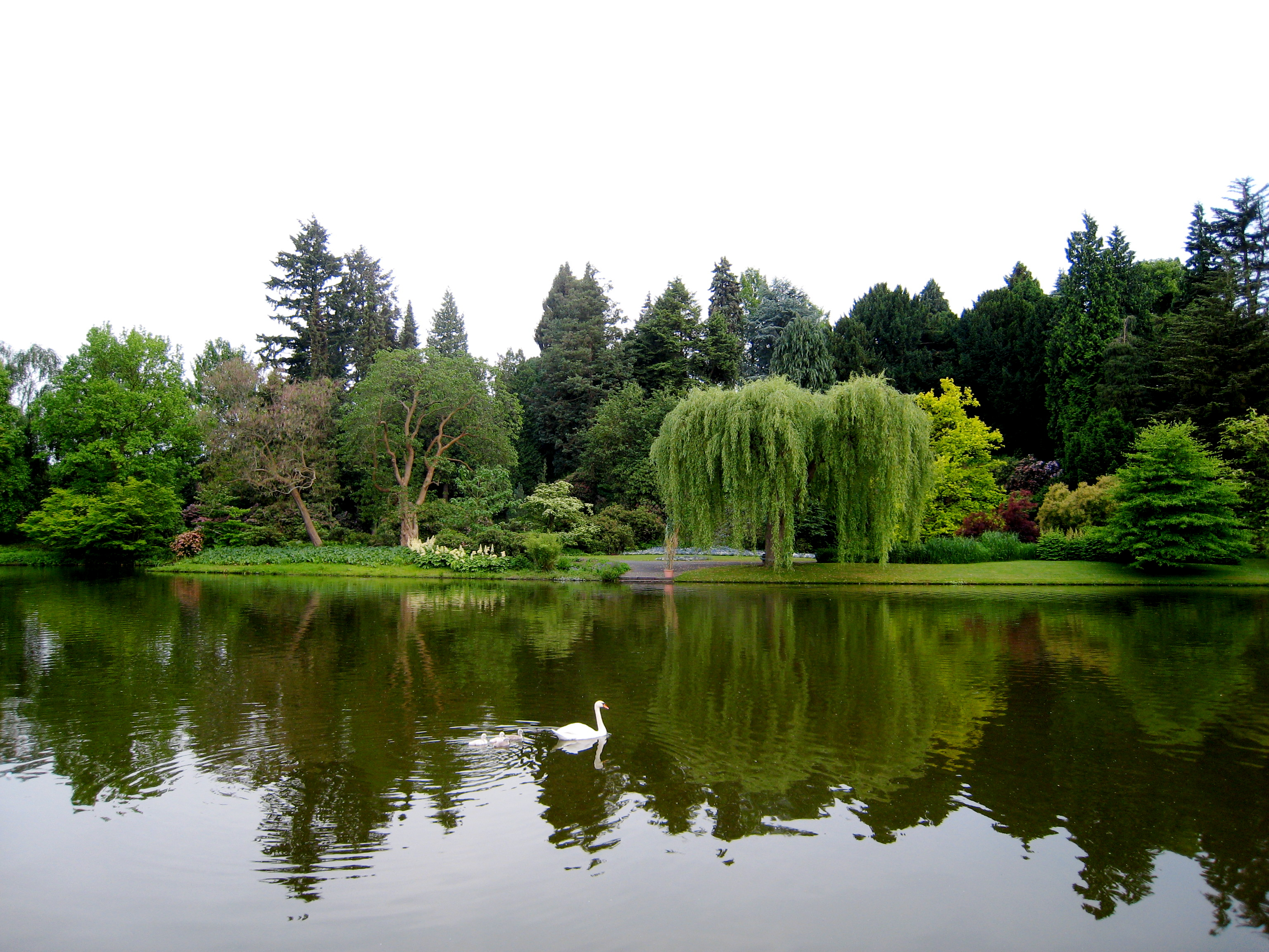 Insel Siebenbergen in der Karlsaue, Kassel